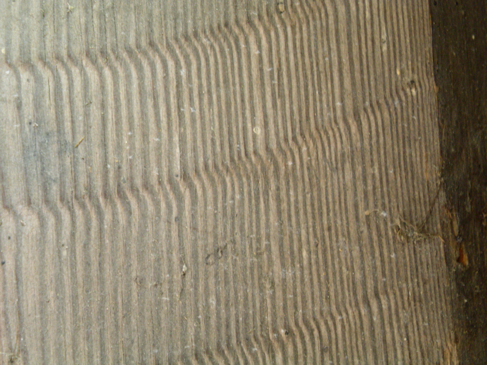 Närbild av slinthuggen gåt i eldhuset vid Zoorns gammelgård i Mora